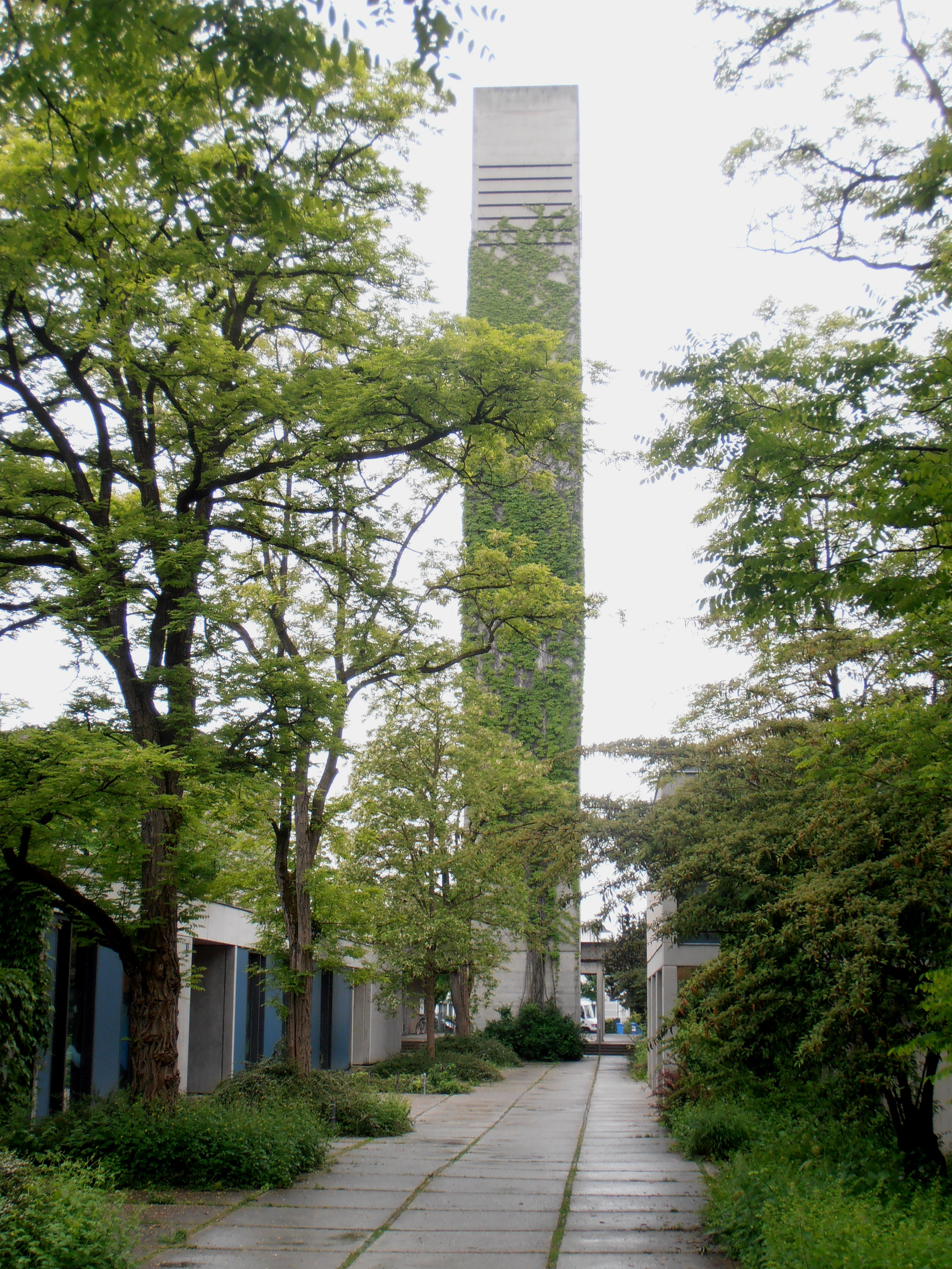 St. Mauritius (München) von Norden Kirchturm und Fußgängerstraße